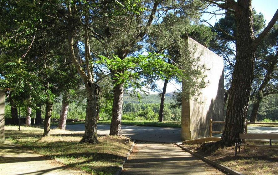 Frontón de Las Escuelas (Cereceda de la Sierra)